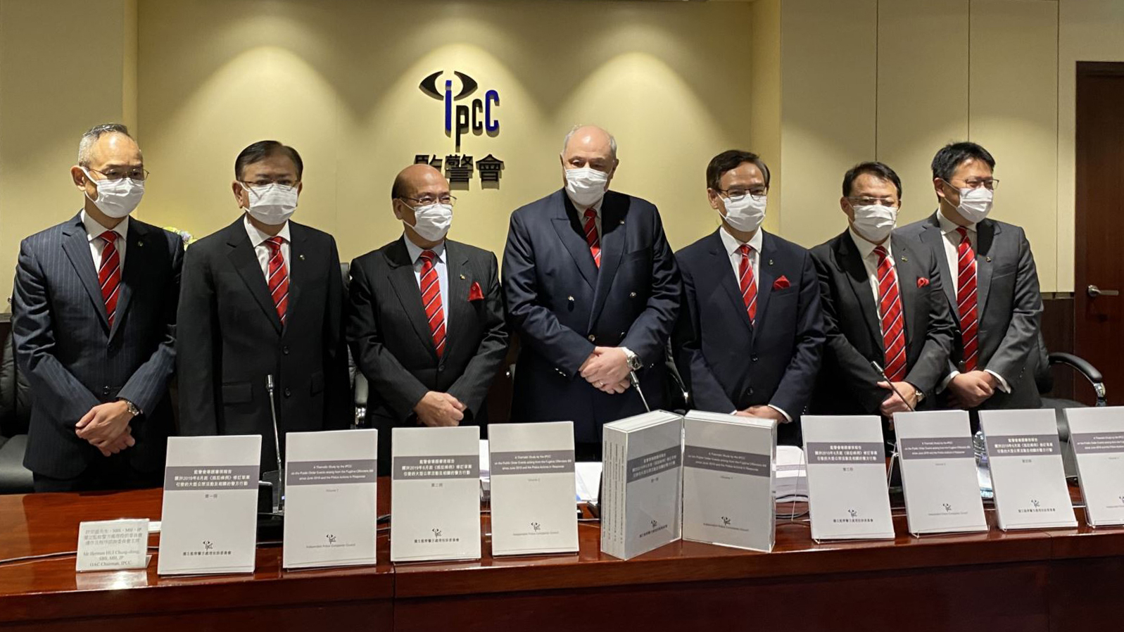 香港监警会5月15日公布反修例运动专题审视报告